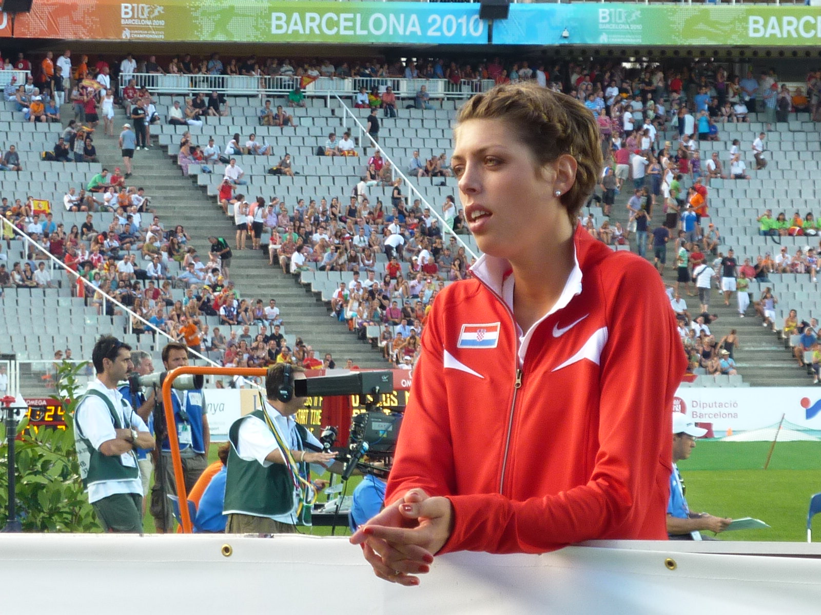 Blanka Vlašić